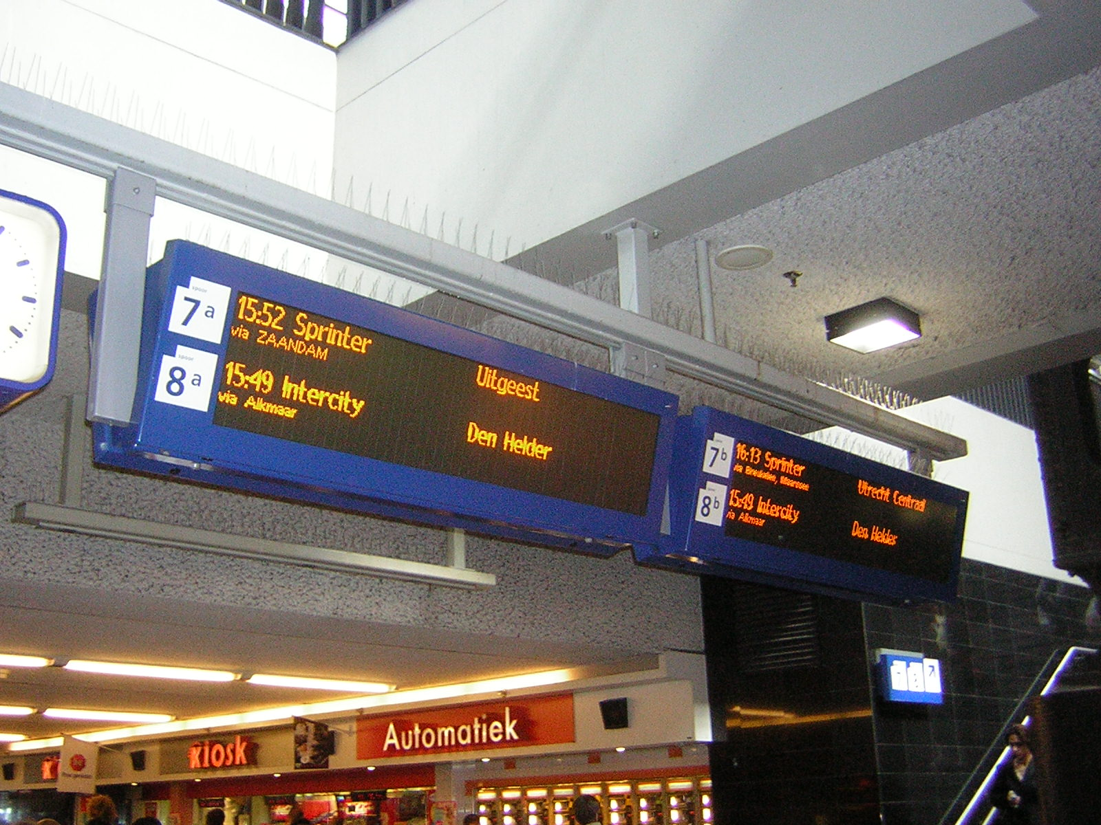 Digitale CTA te Amsterdam Centraal.